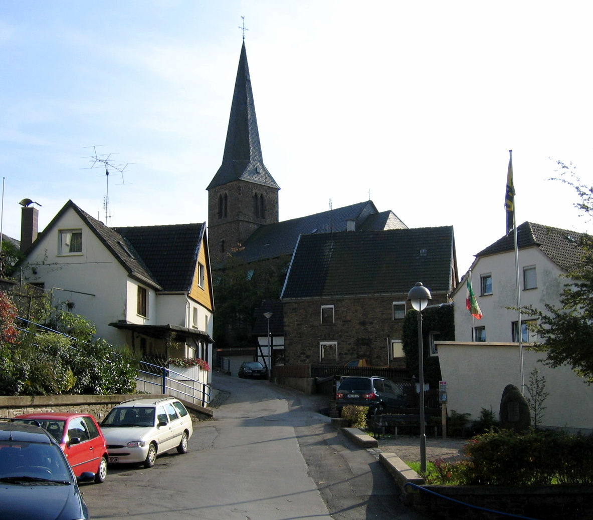 Evangelische Kirche in Altena-Evingsen, Brunnenstraße 13.